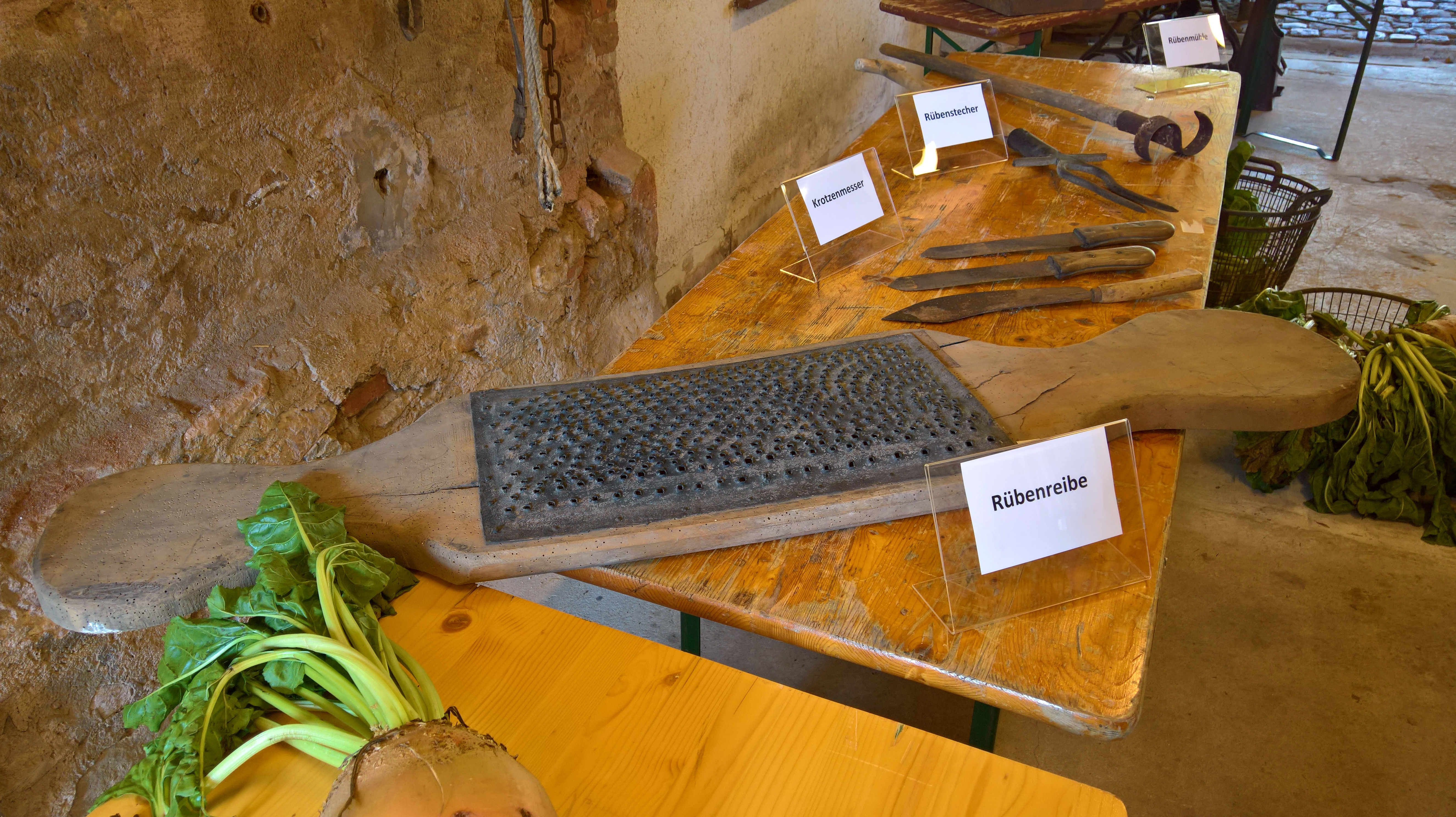 Rübenreibe, Krotzenmesser und Rübenstecher im Museum Gruberhof in Groß-Umstadt.